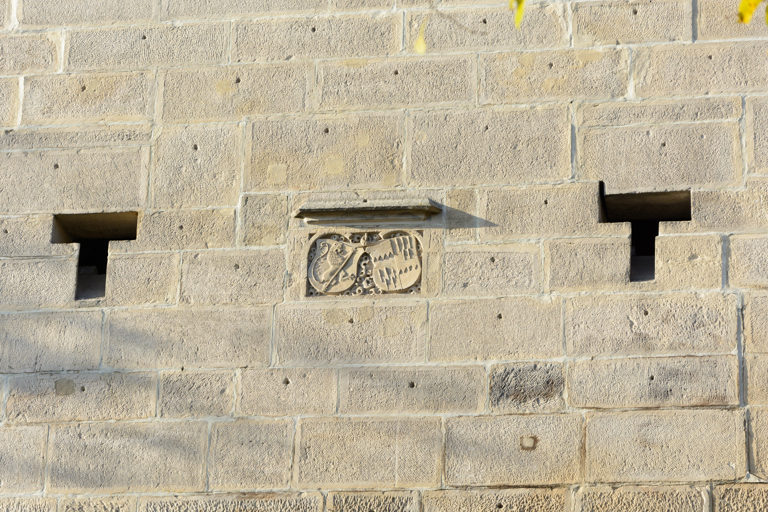 Schießscharten und Wappen des Bamberger Fürstbischofs Georg III. Schenk von Limpurg an der Ostseite der Annakapelle am Melchior-Otto-Platz in Kronach.